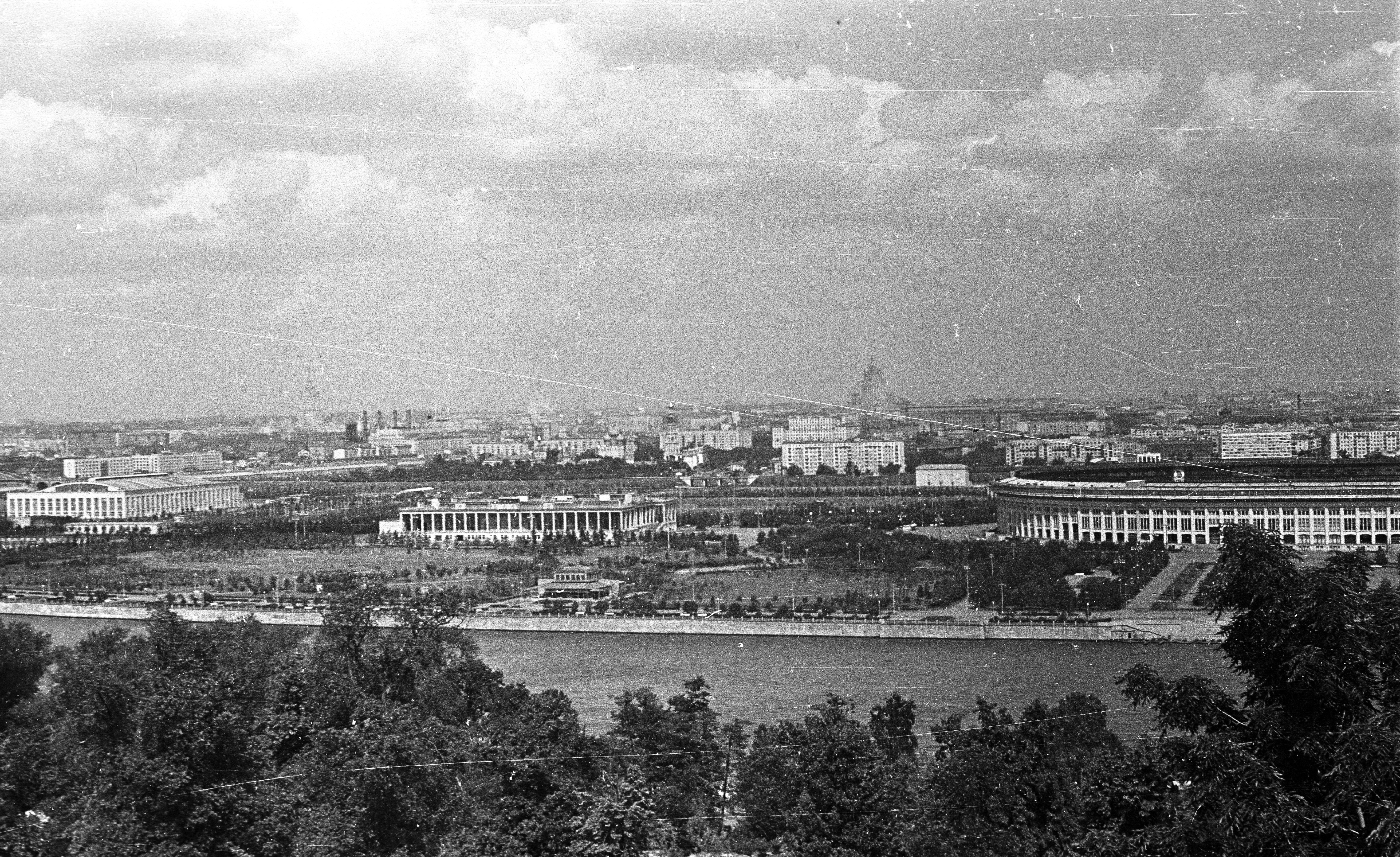 a Moszkva folyó és jobbra a Luzsnyiki stadion a Lomonoszov egyetem irányából nézve. Location: Russia, Moscow Tags: stadium, Soviet Union Title: a Moszkva folyó és jobbra a Luzsnyiki stadion a Lomonoszov egyetem irányából nézve.